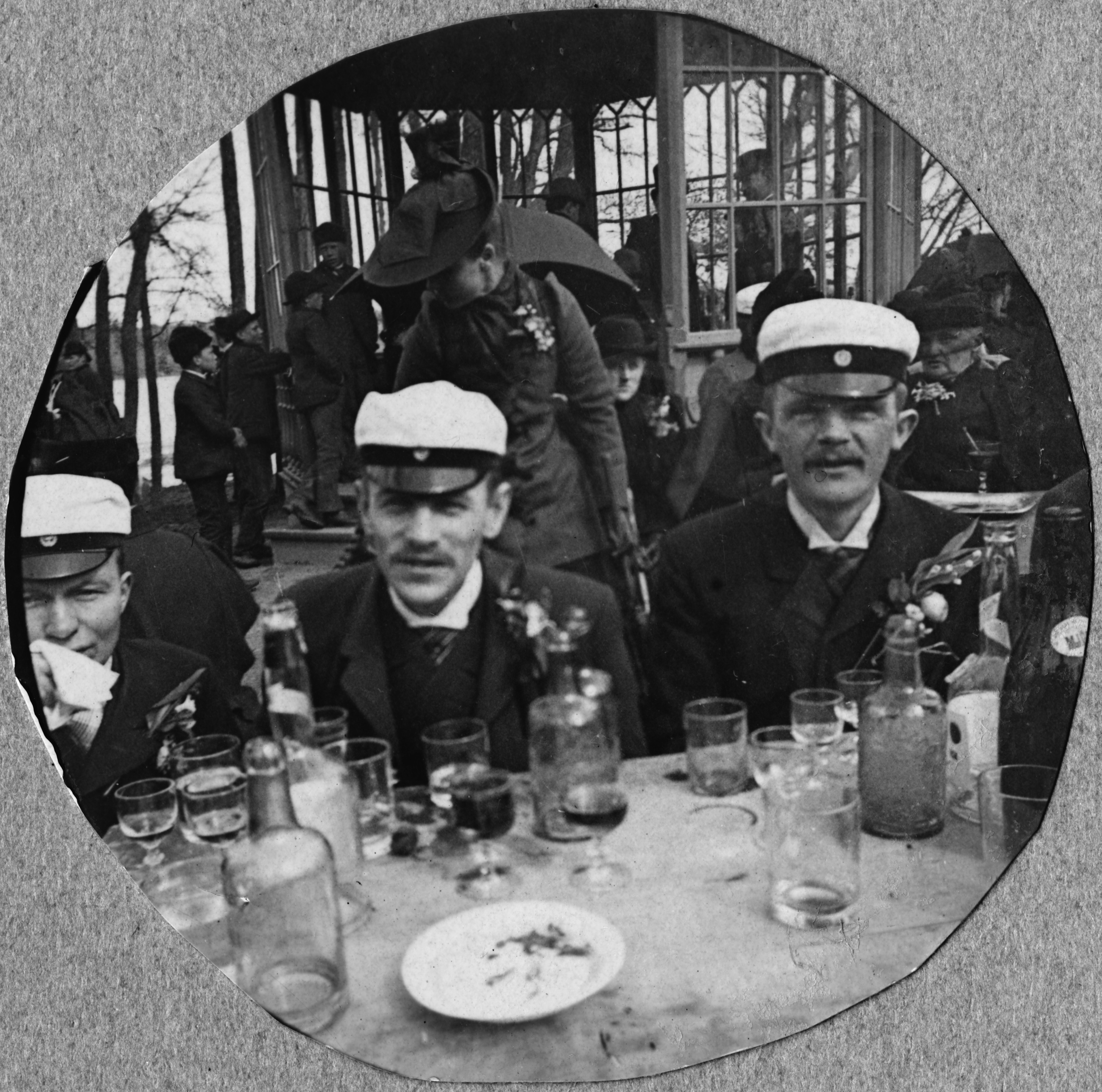 Ylioppilaiden vapunviettoa ravintola Kaisaniemessä. -- negatiivi ja vedos, lasi paperi pahvi, mv